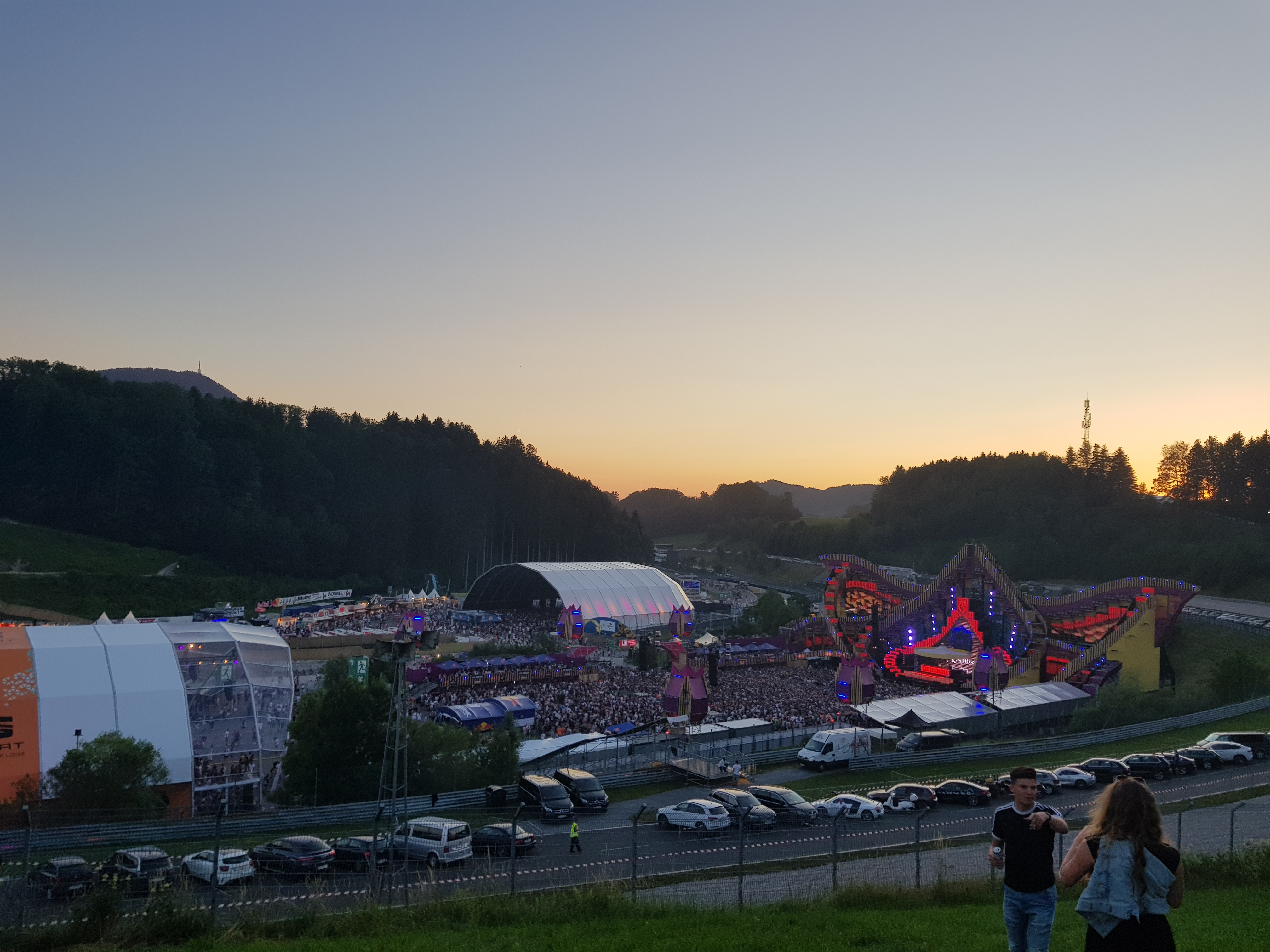 Electric Love 2019